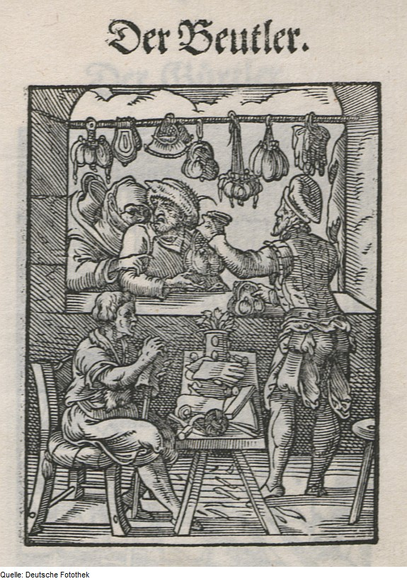 Original image description from the Deutsche FotothekStändebuch & Handwerk & Beutler & Beutelmacher Der Beutler